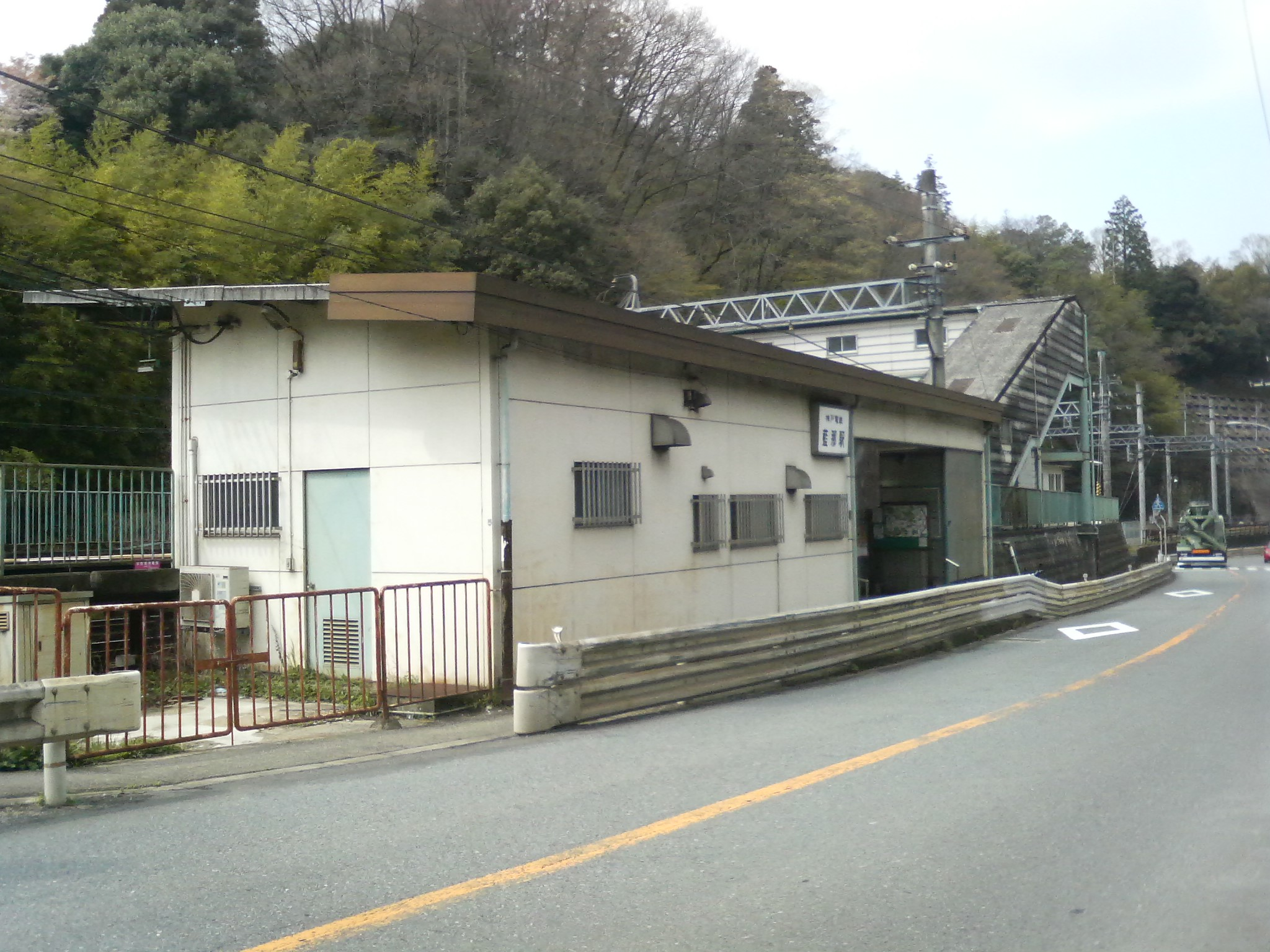 2008年4月14日撮影 Category:神戸電鉄の画像 Category:鉄道駅画像 Category:神戸市北区の画像